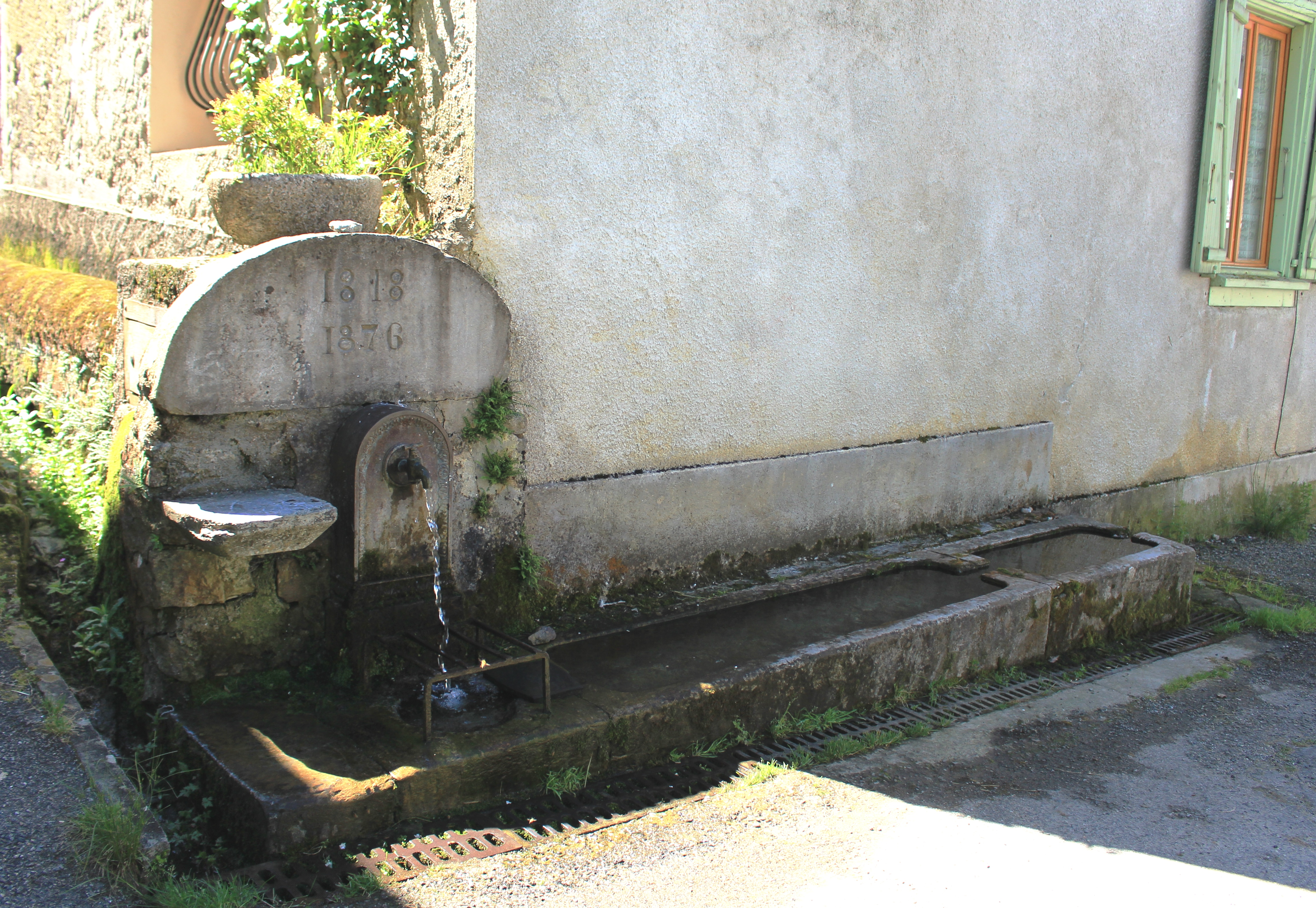 Fontaine de Gerde (Hautes-Pyrénées)